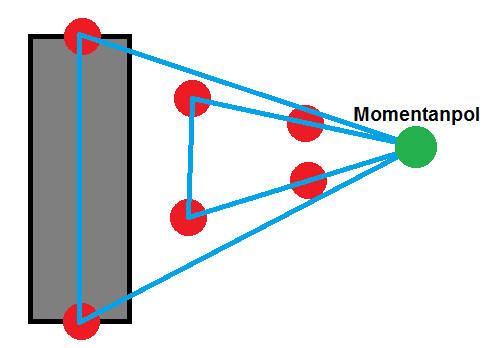 Momentanpol